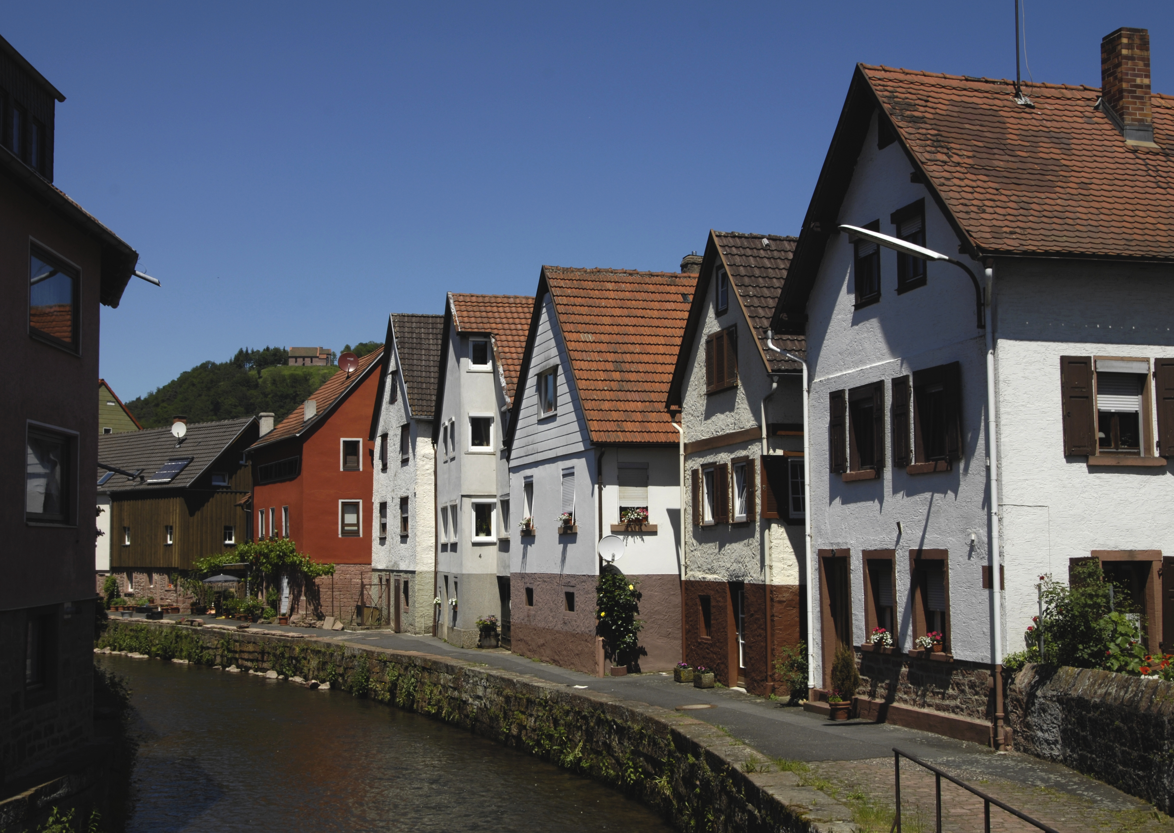 Amorbach, Häuserzeile am Fluss